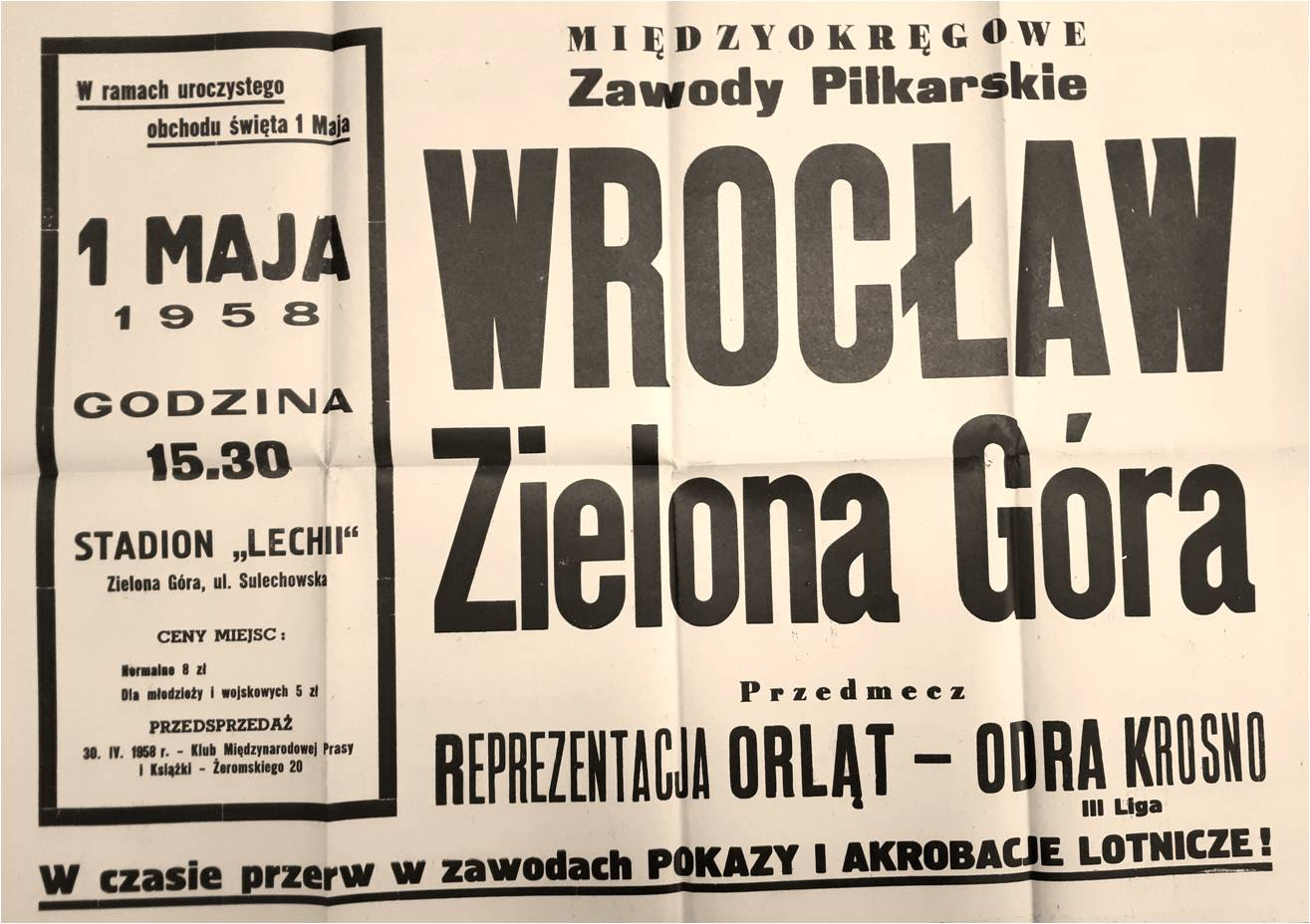 Plakat Międzyokręgowych Zawodów Piłkarskich /meczu/ Wrocław - Zielona Góra z przedmeczem Reprezentacji Orląt z Odrą Krosno. W czasie przerwy pokazy i akrobacje lotnicze. Impreza na stadionie Lechii Zielona Góra.